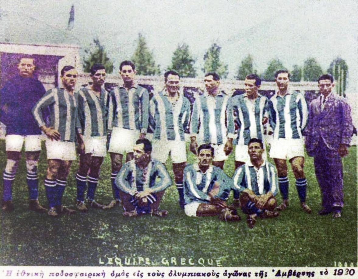 Η ομάδα ποδοσφαίρου της εθνική Ελλάδος στους Ολυμπιακούς Αγώνες της Αμβέρσας το 1920.